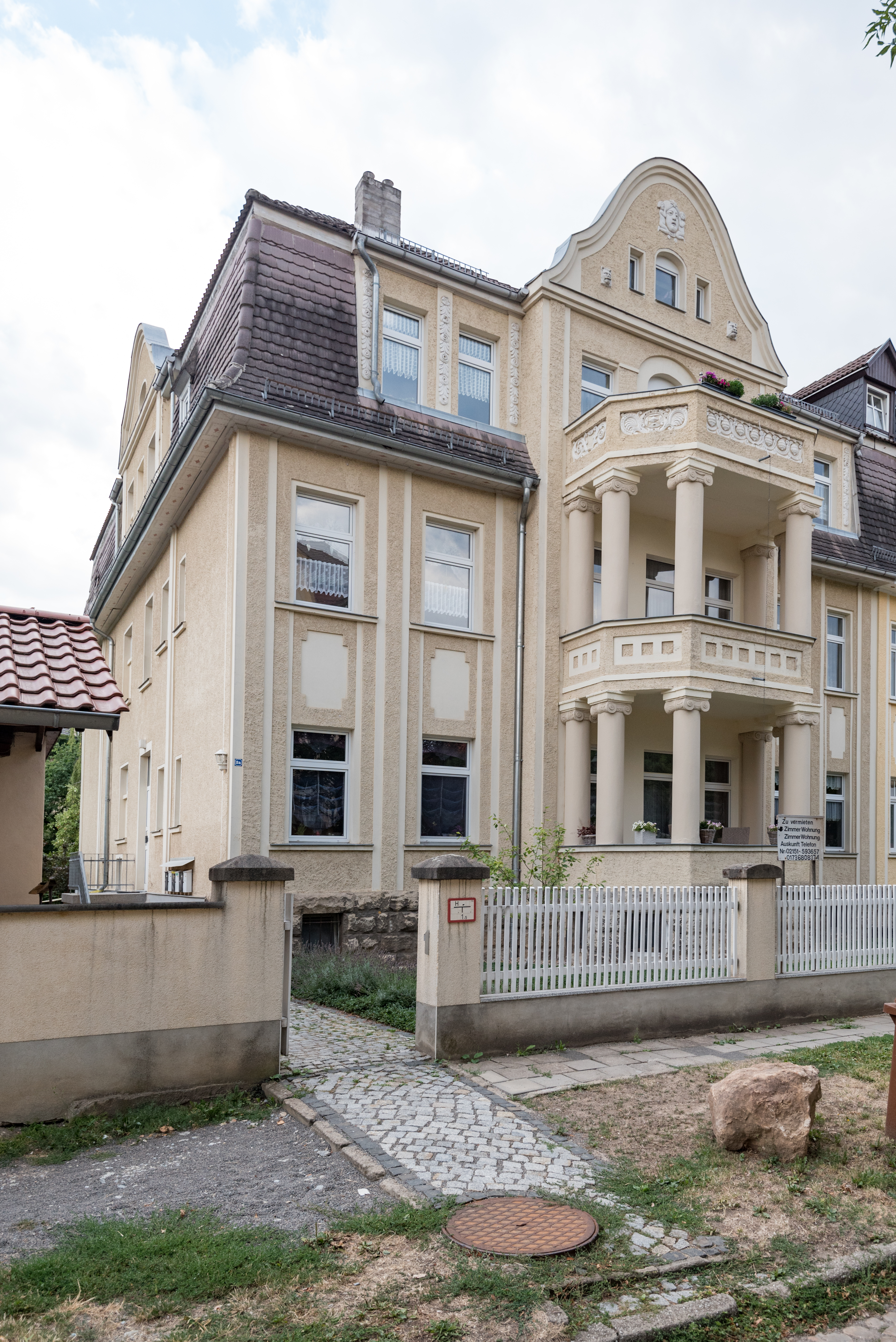 Naumburg (Saale), Theodor-Körner-Straße 2a